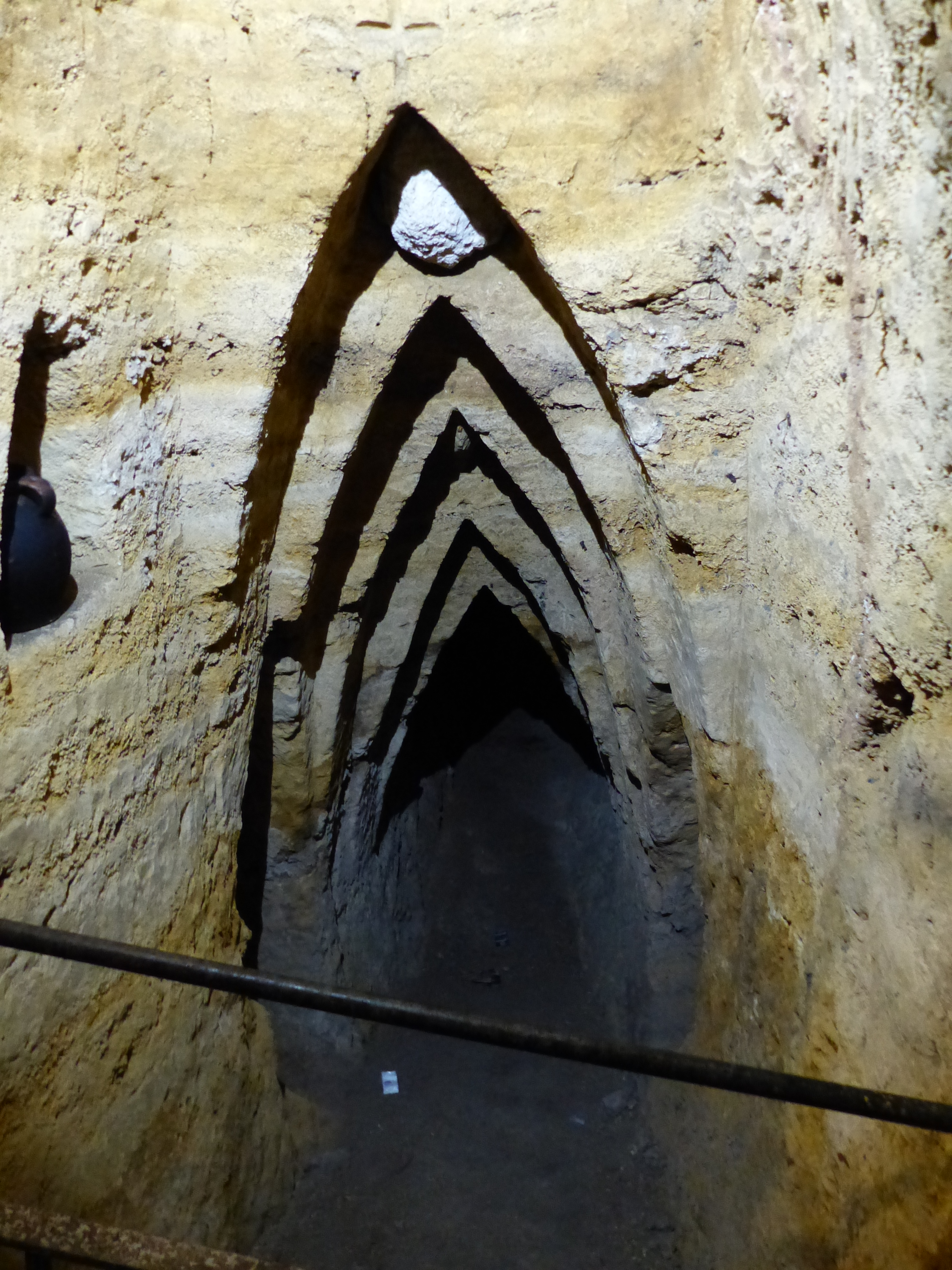 Cueva árabe de Brihuega, Guadalajara